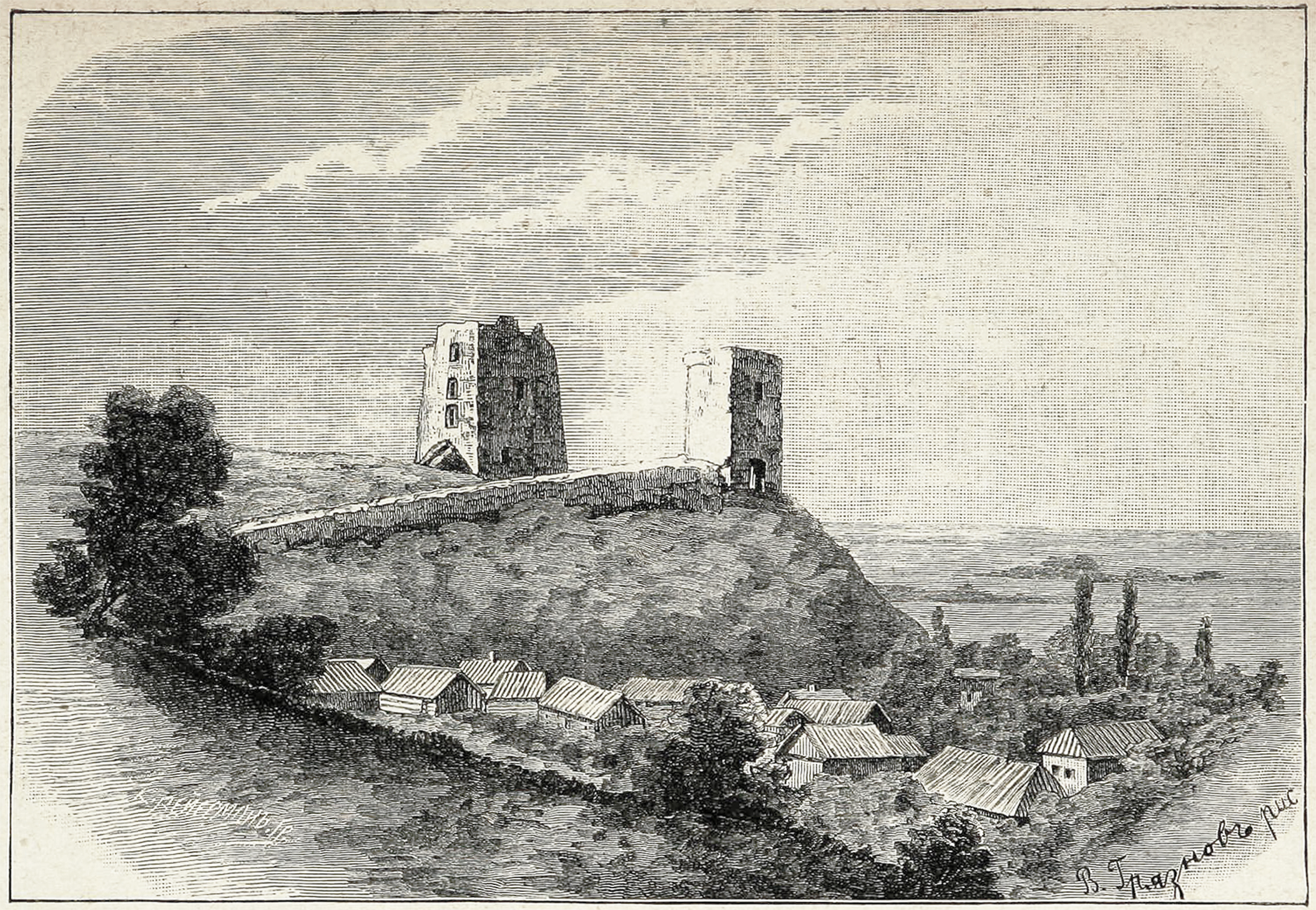 Беларуская (тарашкевіца): Наваградак (Navahradak), замак